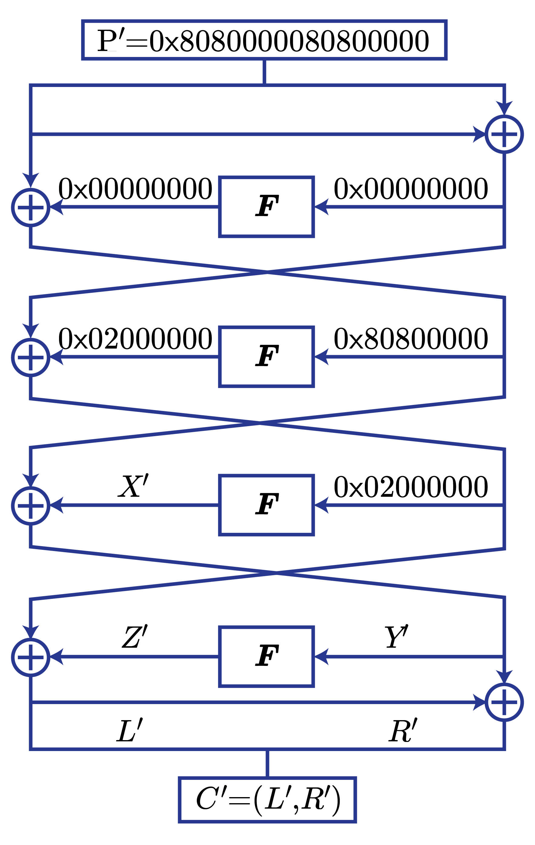 תיאור התקפה דיפרנציאלית על צופן FEAL-4